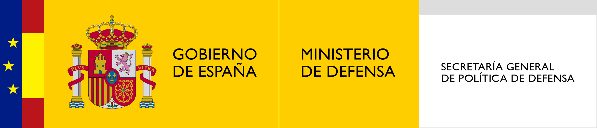 Logotipo de la Secretaría General de Política de Defensa